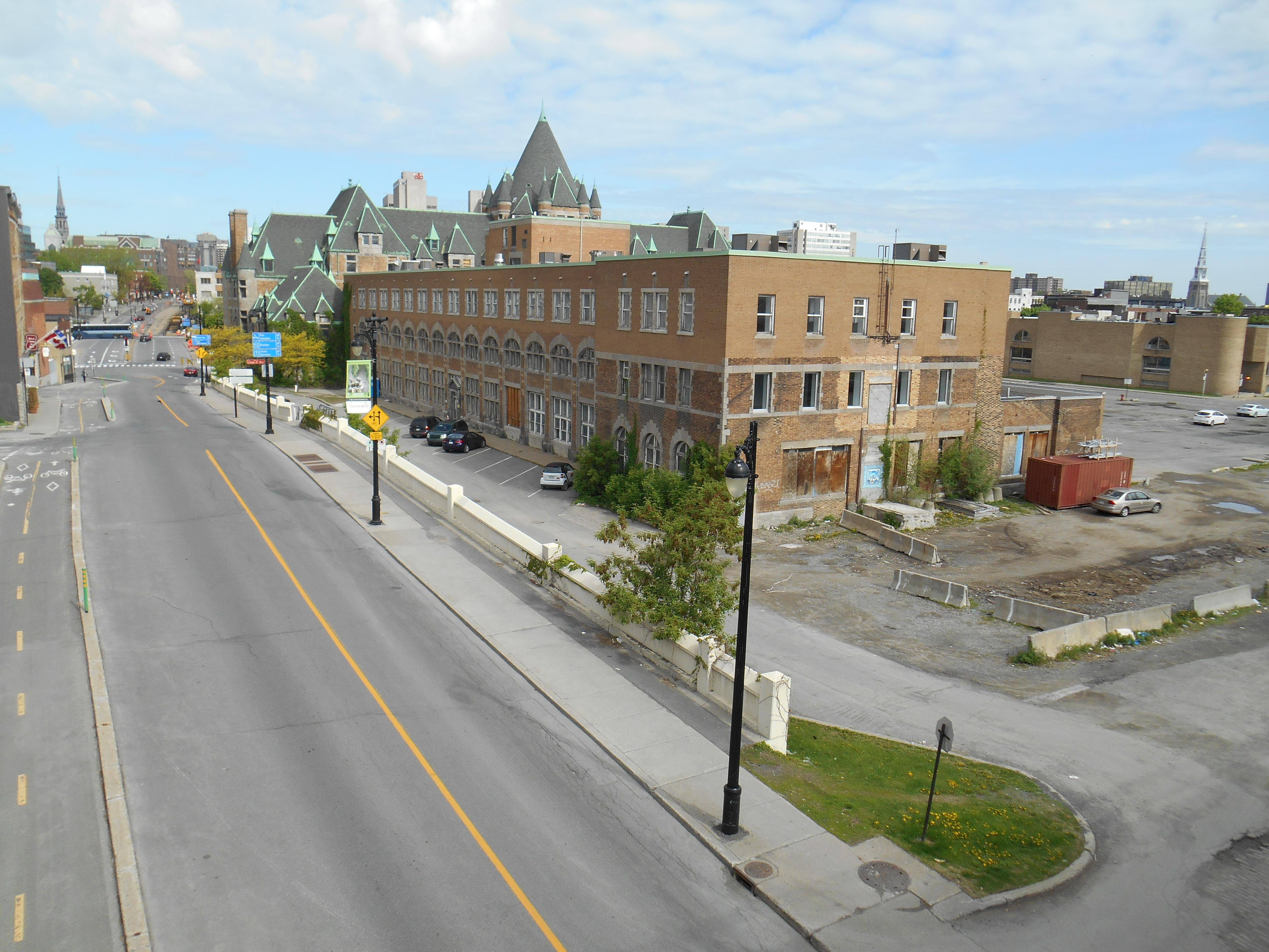 Gare Berri (autre appellation : Nouvelle gare Viger), 755-775, rue Berri, Montréal